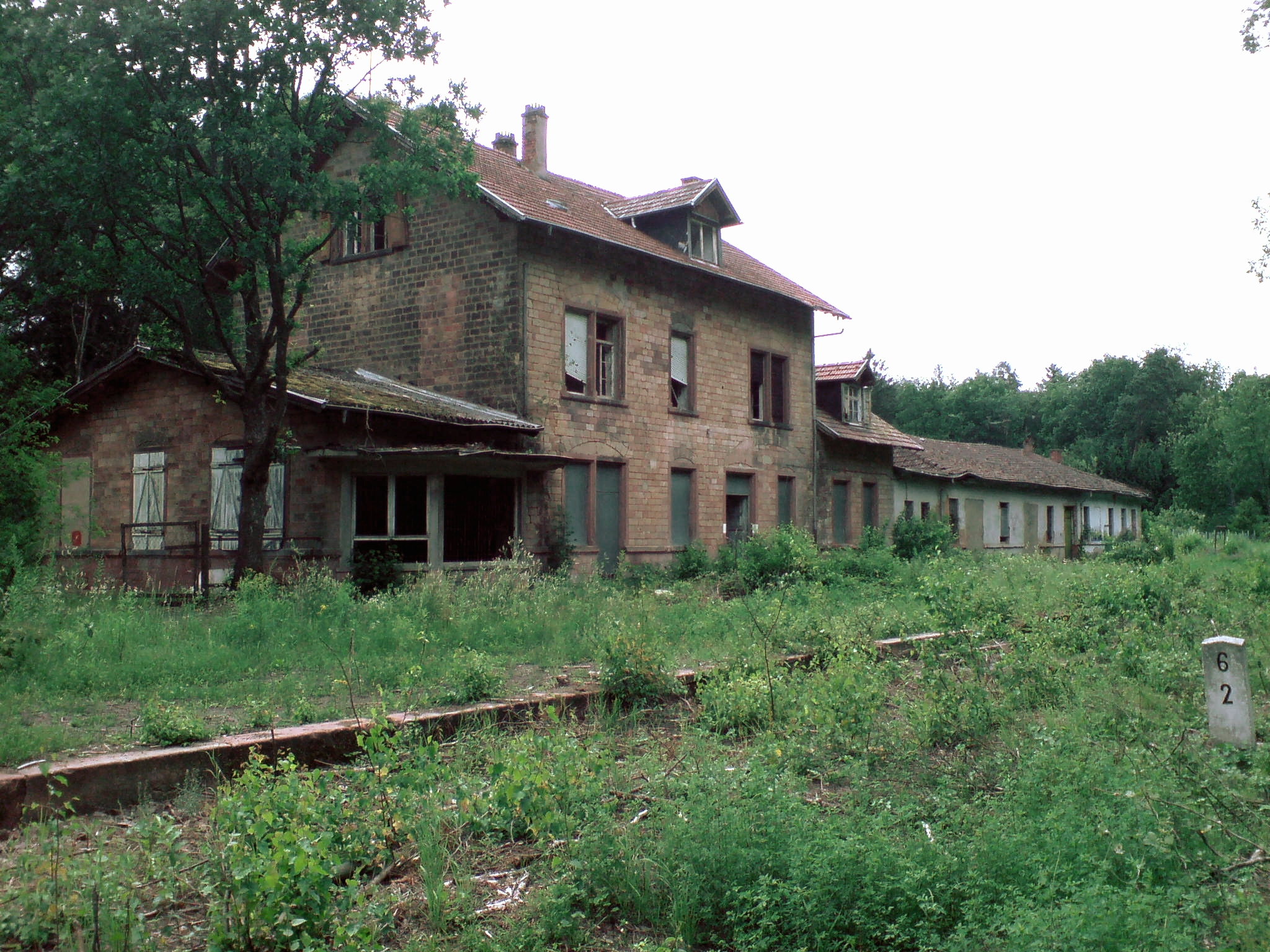 Jägersburger Bahnhof von den Bahngleisen aus gesehen